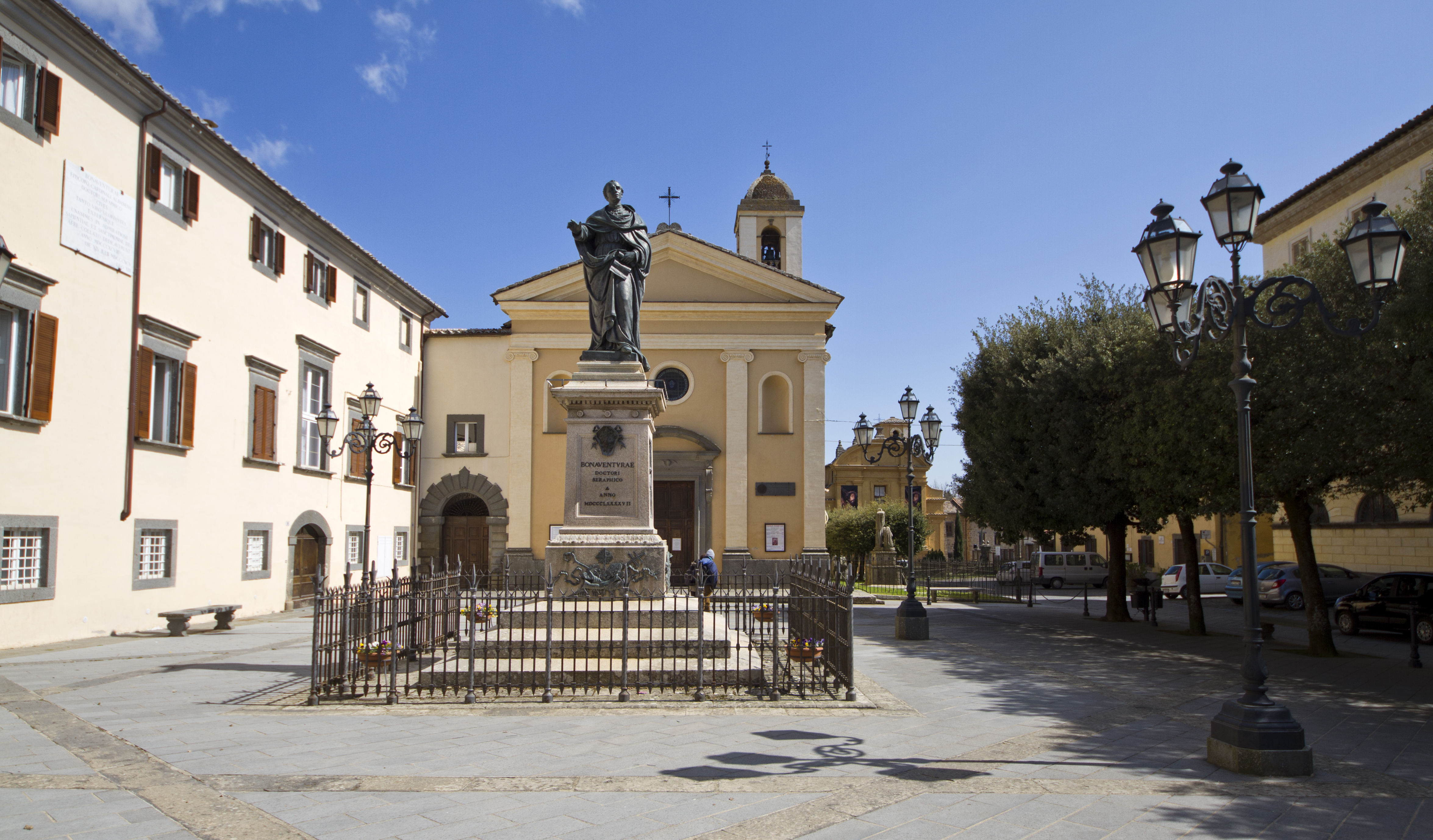 01022 Bagnoregio VT, Italy